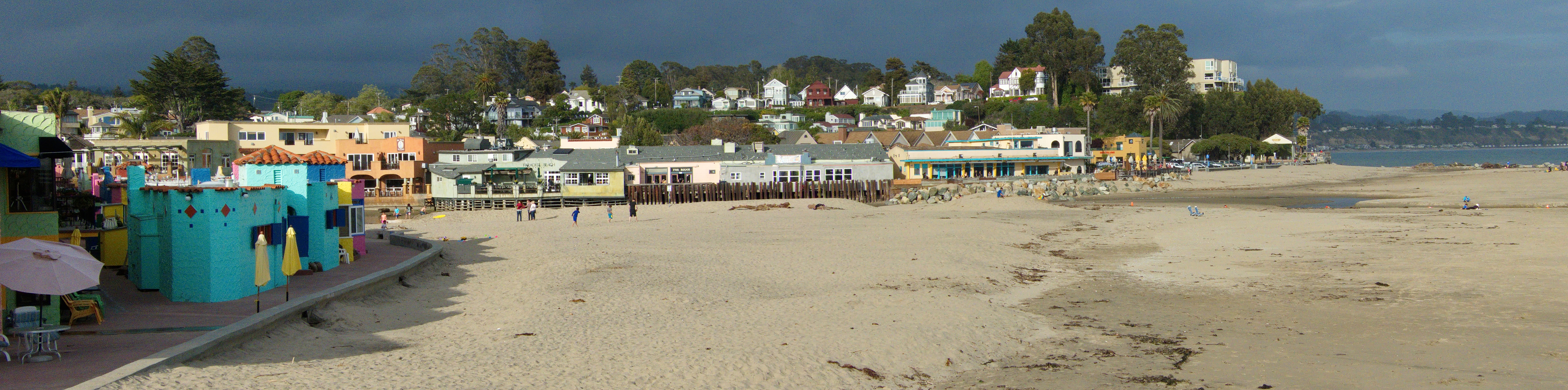 Capitola, California - 2014